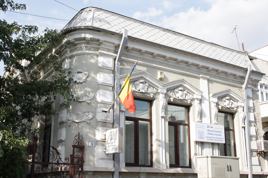 Casă, Str. Alexandrescu Grigore 39 sector 1